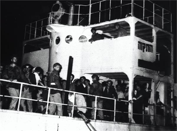 אונית המעפילים "התקוה" בחוף המולדת